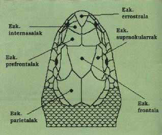 Eskailera-sugearen buruaren bista dortsala